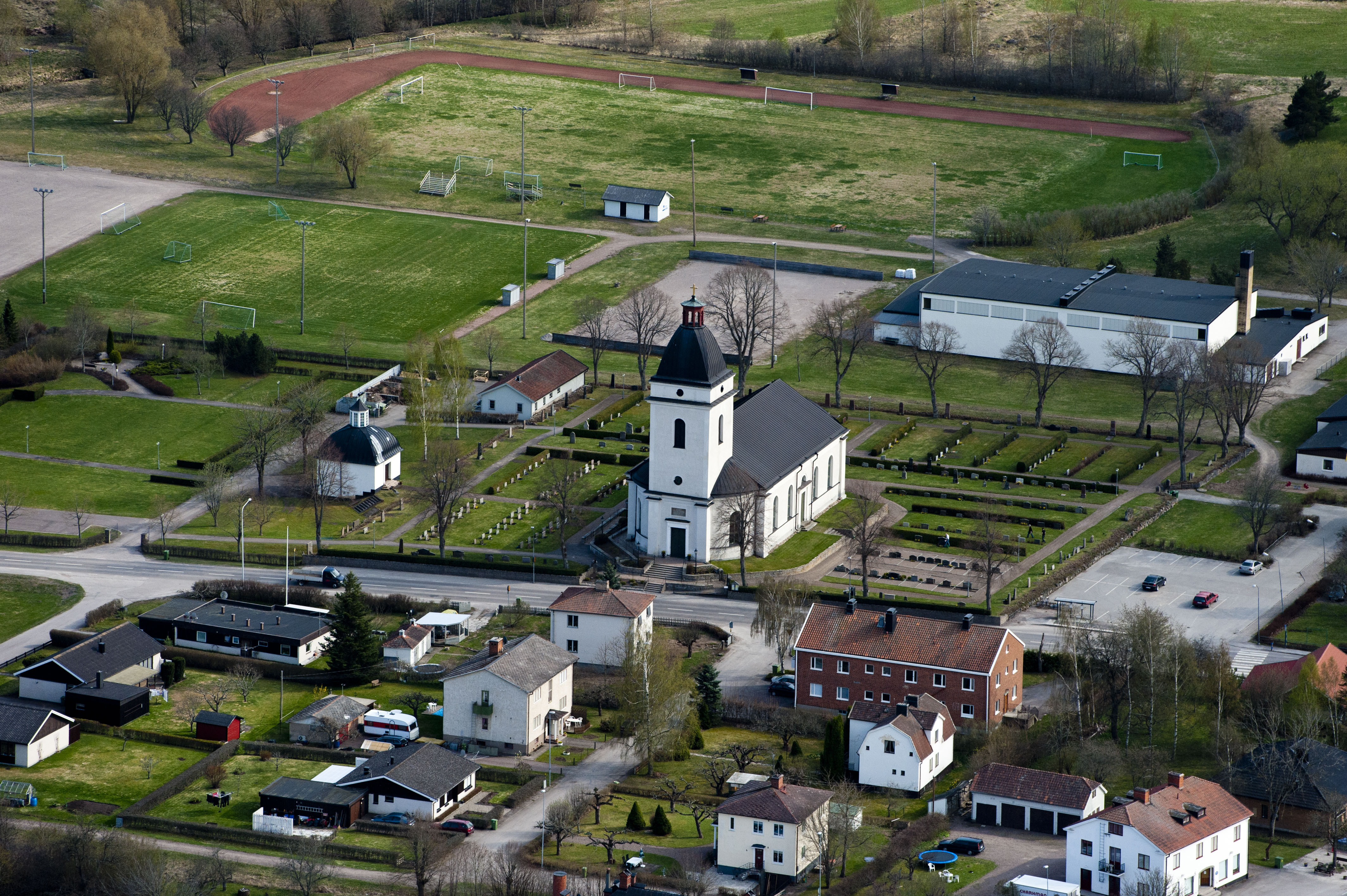 Väderstads ka